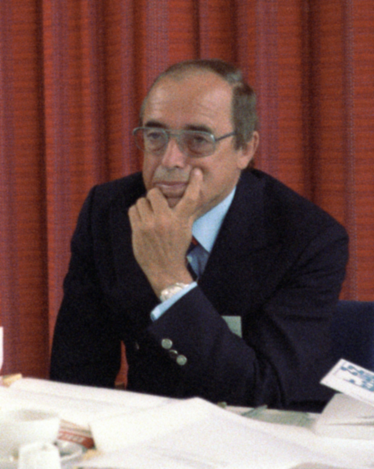 Gerhard Schröder, ehemaliger Intendant des NDR und auch von Radio Bremen